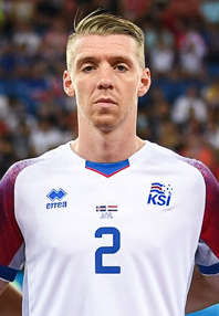 Сборная Исландии уступает Хорватии и покидает ЧМ-2018